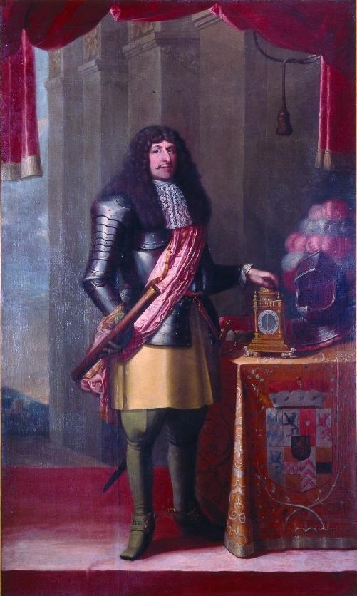 Porträt des Pfalzgrafen Christian August (1622-1708) mit Pfalzgrafenstab in der rechten Hand. An der Vorderseite der Tischdraperie das Pfalz-Sulzbacher Wappen.